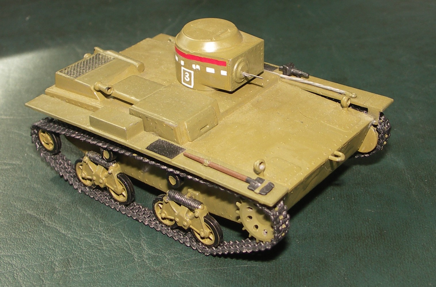 Модель танка Т-38 выпуска фирмы AER Moldova, масштаб 1:35